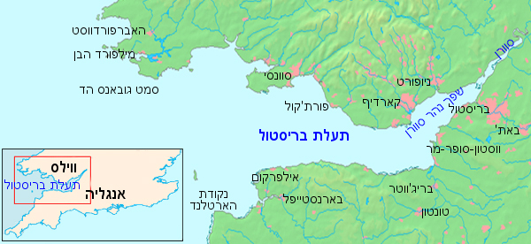 Bristol channel